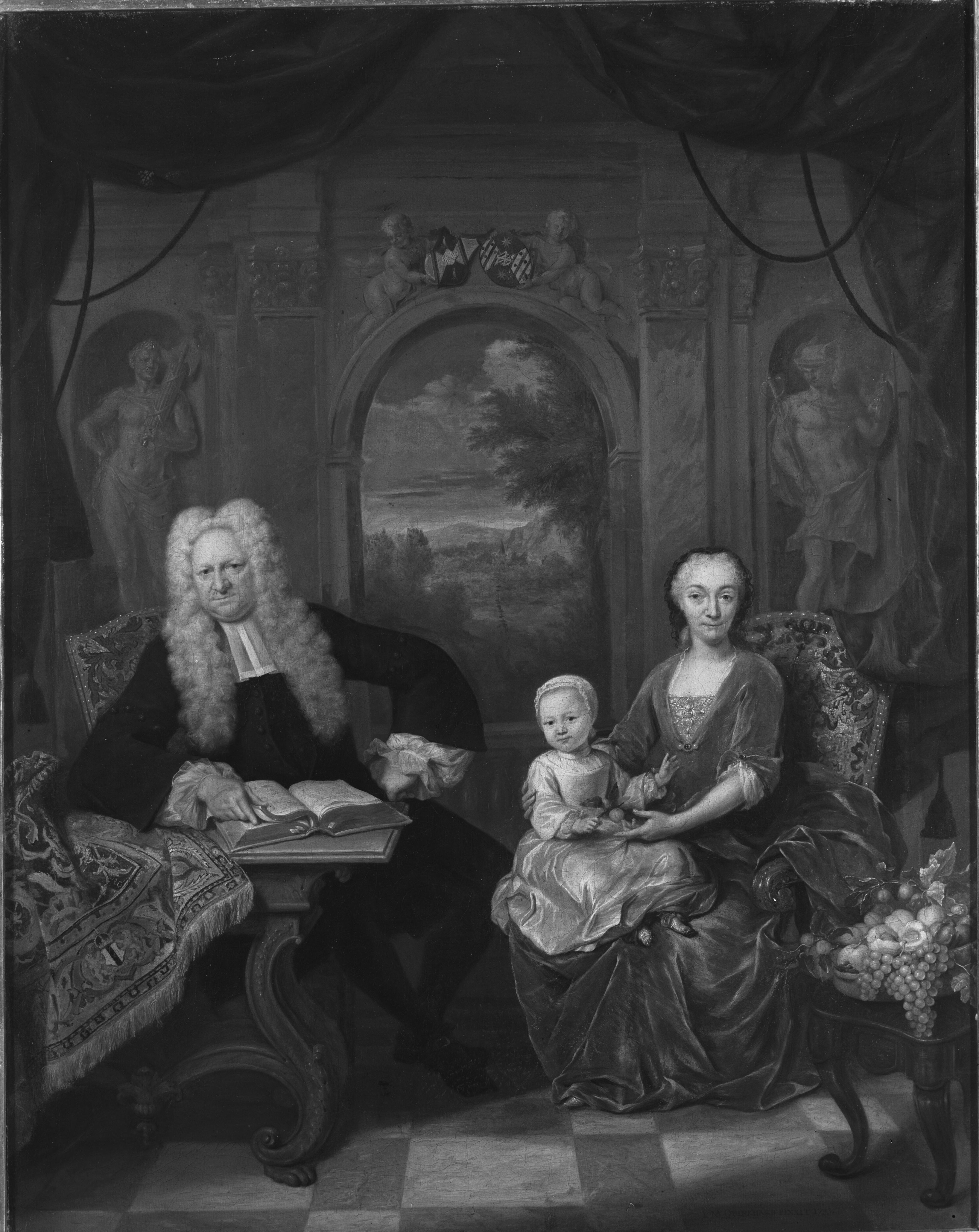 detail van een schilderij met Anna de Haze (1690-1761) en Lieve Geelvinck (1730-1757)